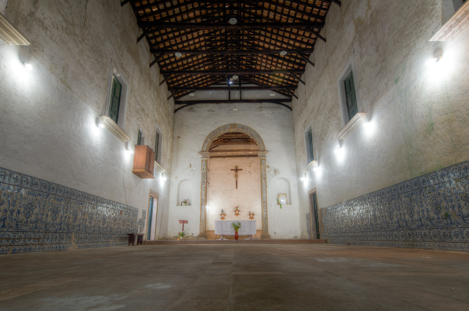 Convento de Santo Antônio de Paraguassú: igreja e ruínas